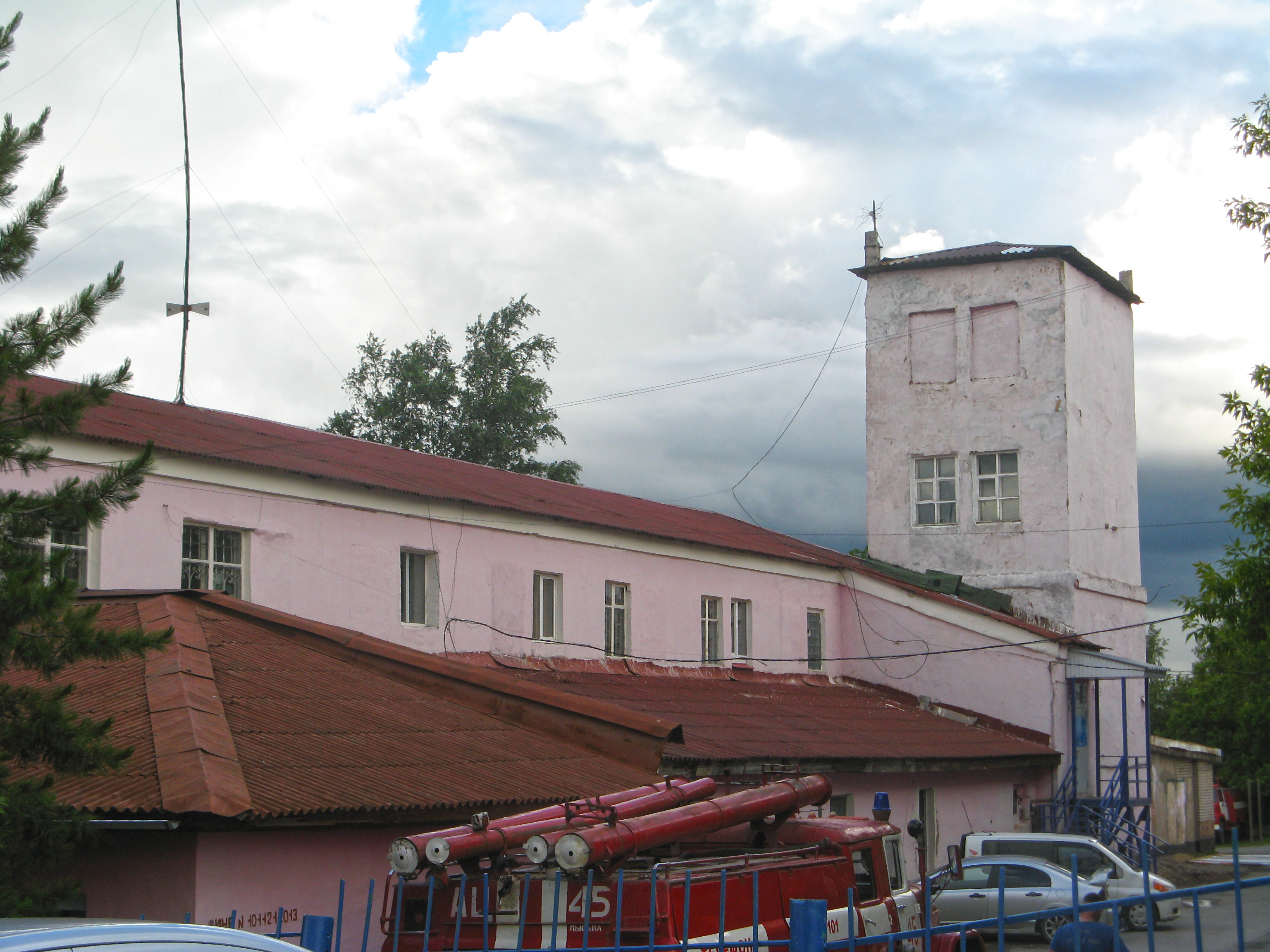 Лысьва, пожарная часть на улице Революции